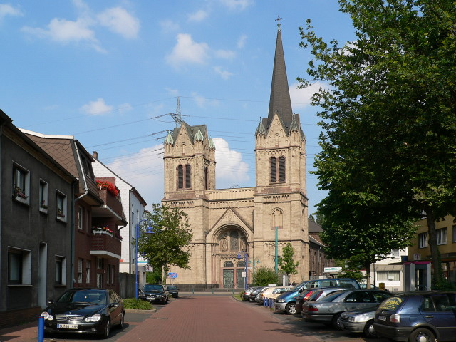 Katholische Kirche St. Ewald in Laar (Duisburg)